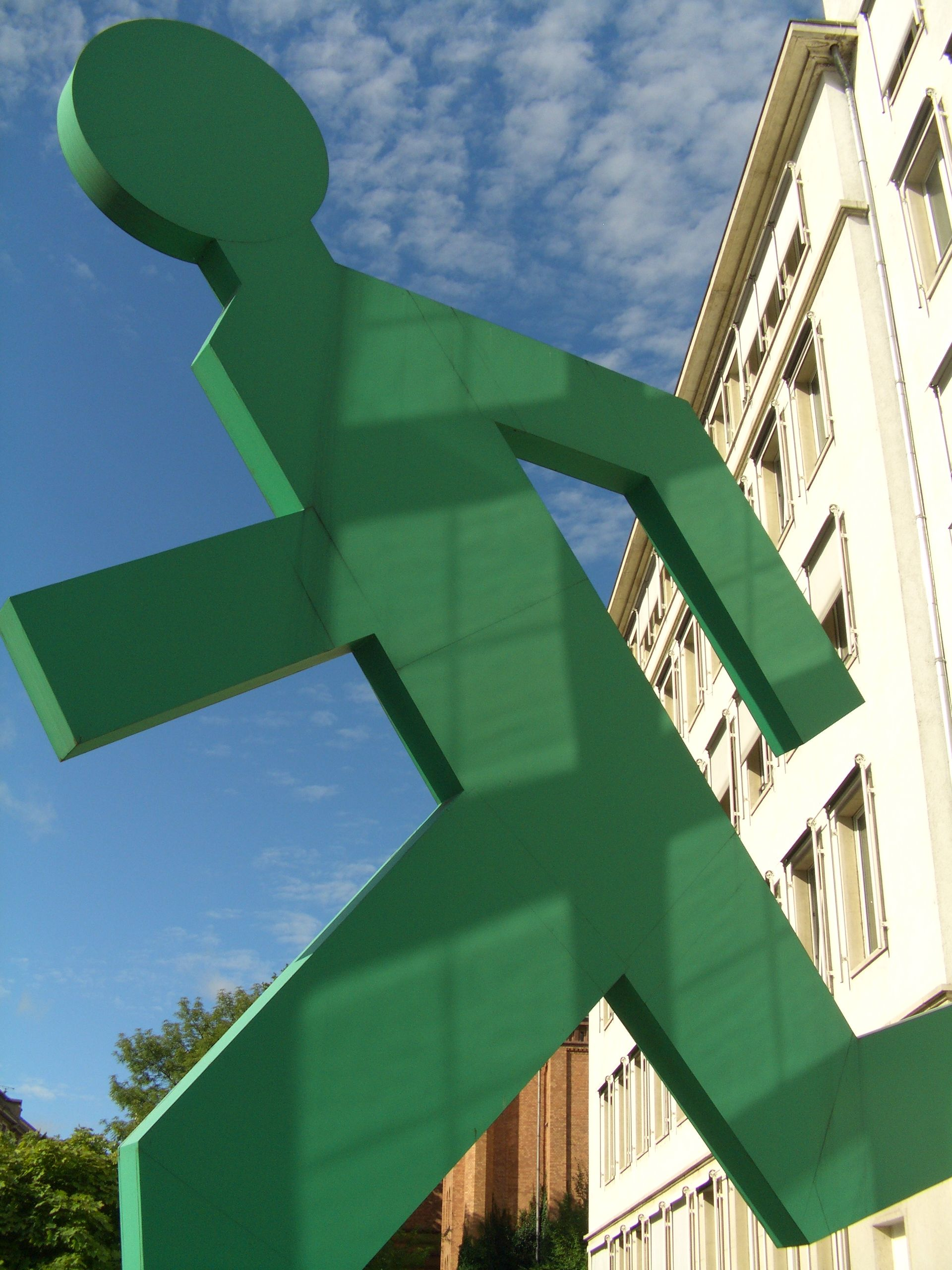 "Mr. Quick" - Skulptur von Ottmar Hörl vor dem Frankfurter dpa-Büro Selbst fotografiert, Lizenz: gemeinfrei